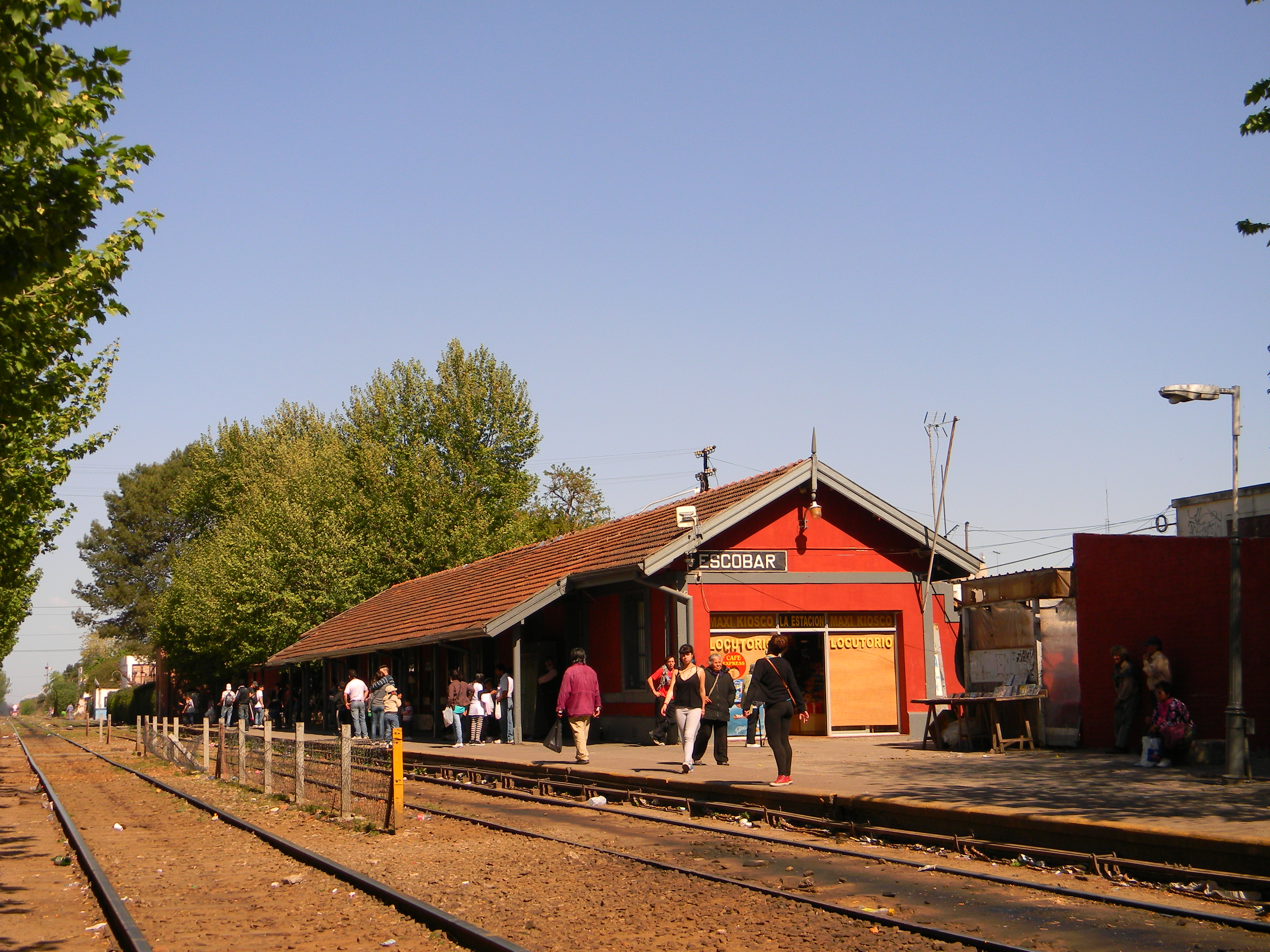 Estación Escobar